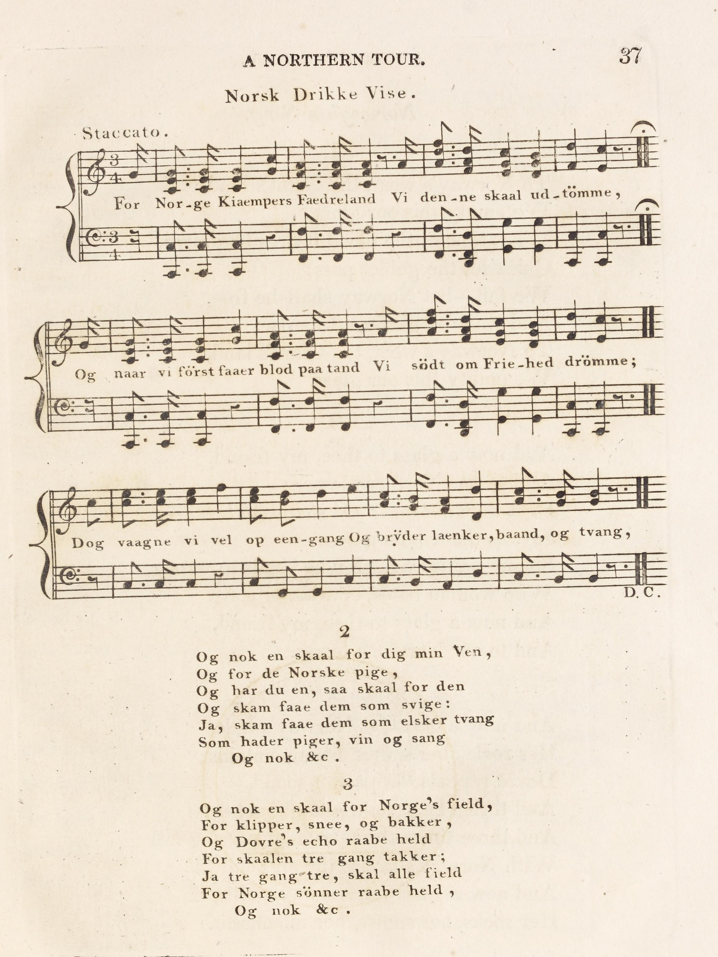 Illustrasjon hentet fra boken "Sketches on a tour to Copenhagen, through Norway and Sweden" av Wolff, Jens og utgitt av Baldwyn and Co. (gb, 1816)